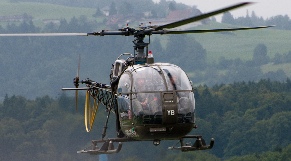 20100724-_DSC8480